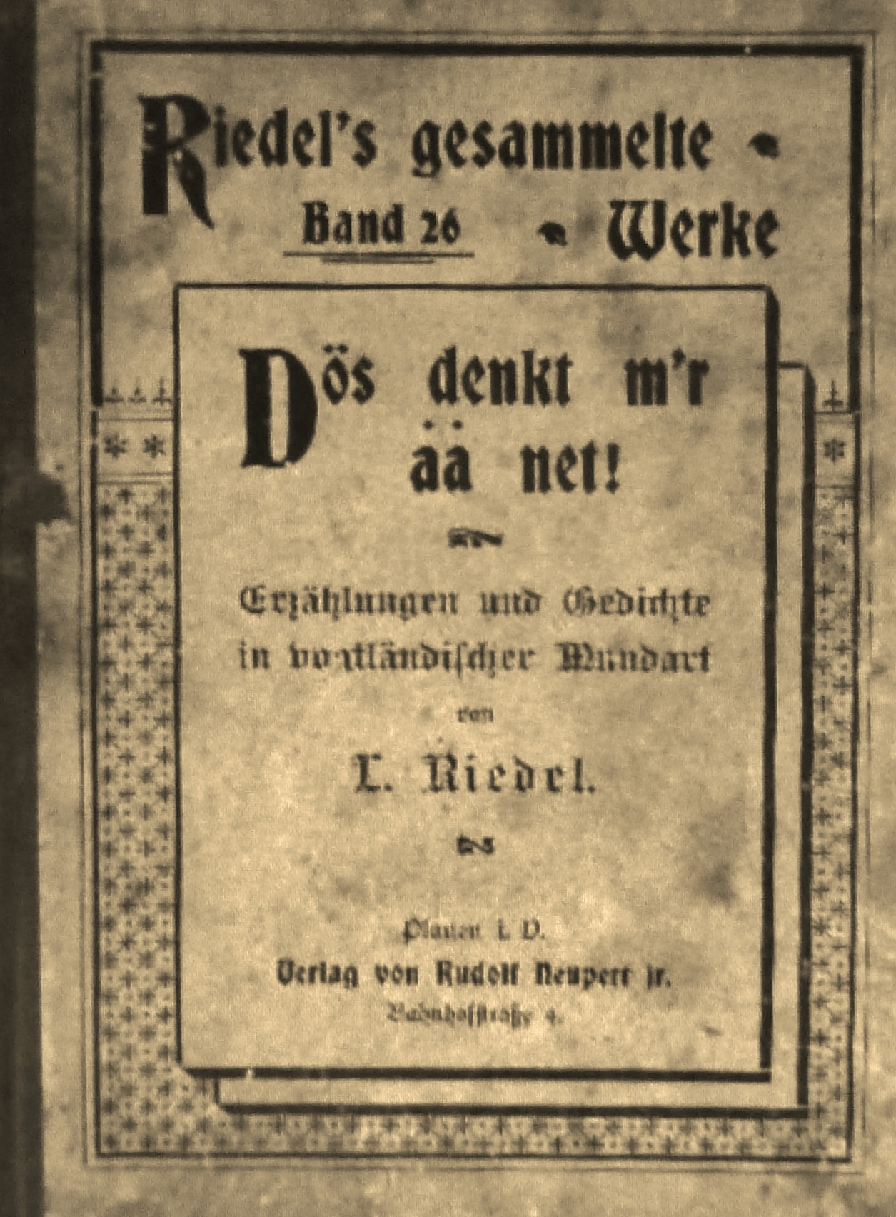 Louis Riedel: Riedels gesammelte Werke, Bd. 26 (Dös denkt m'r ää net!, Verlag Neupert Plauen etwa 1900